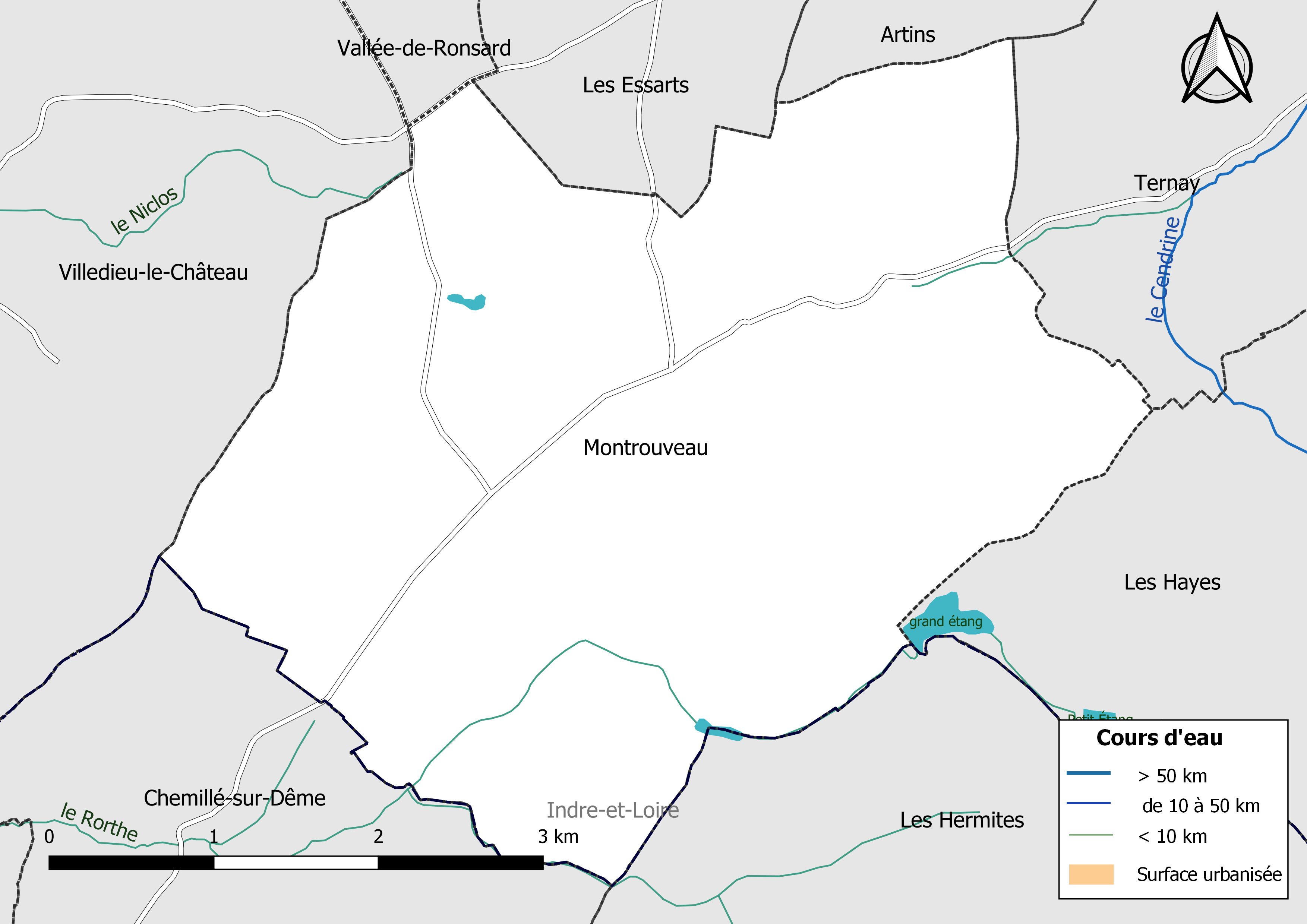 Carte du réseau hydrographique de la commune de Montrouveau (Loir-et-Cher, France).